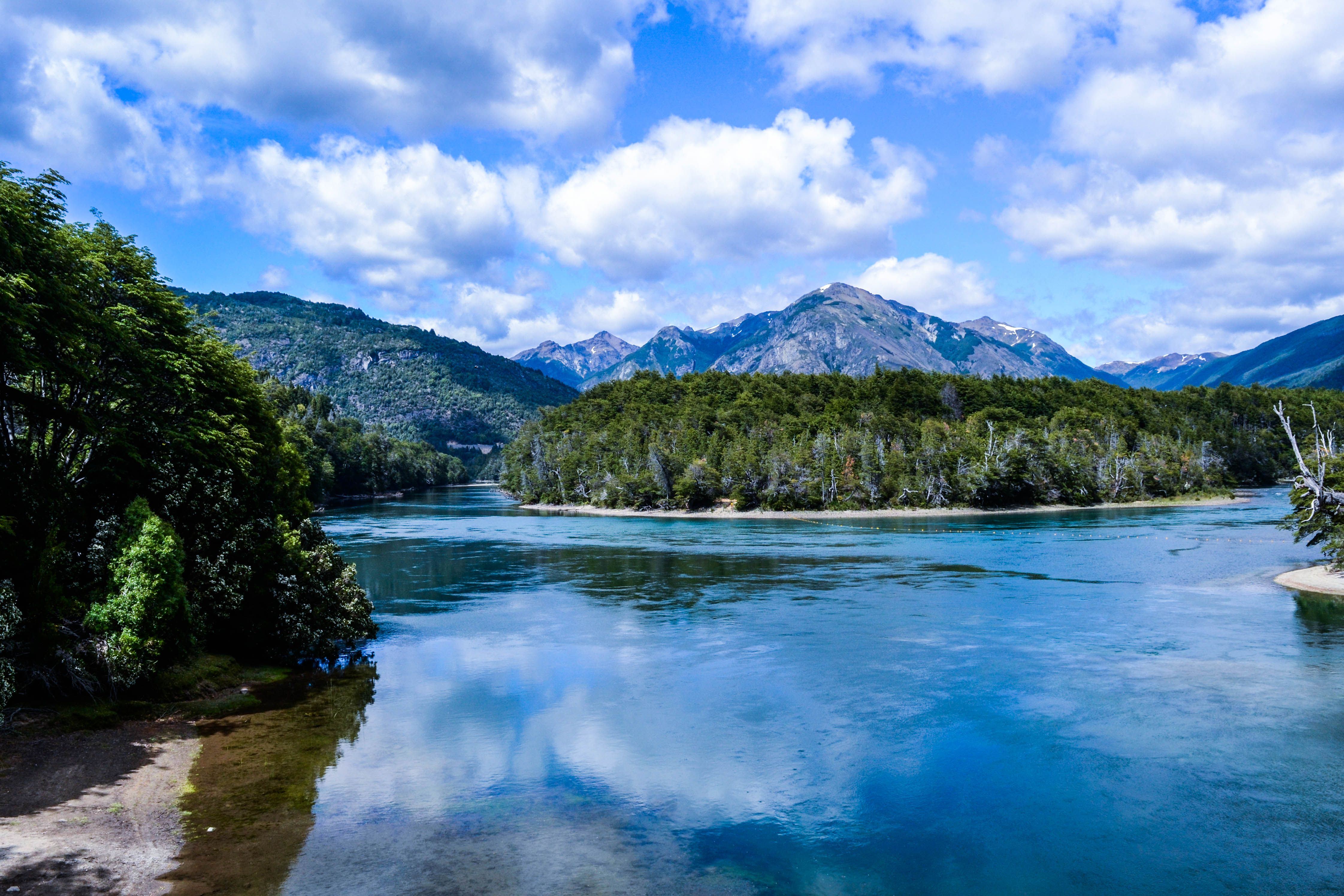 Parque Los Alerces - Lago